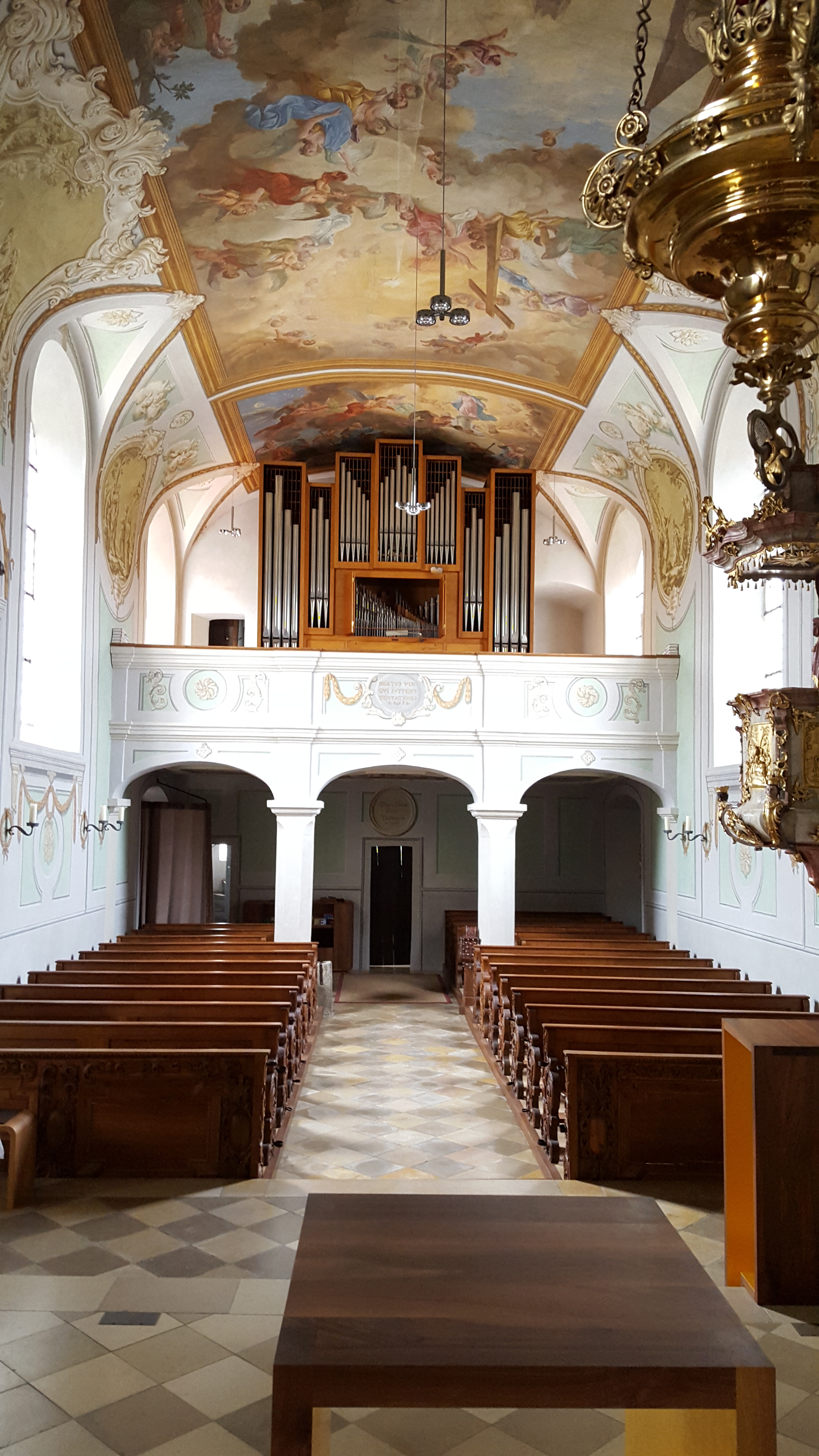 Langhaus mit Orgel und Empore in St. Jakobus der Ältere in Hörgertshausen